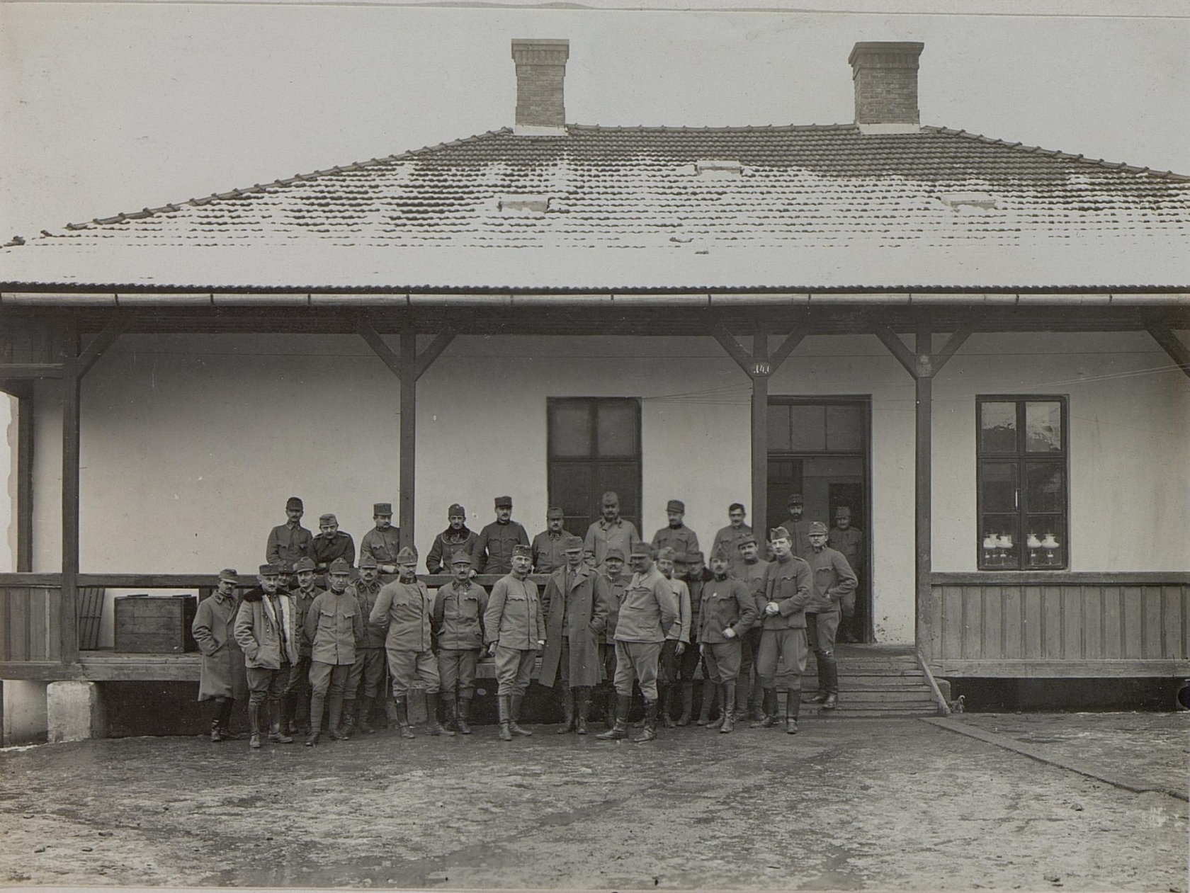 Brigadekommando Obstlt. PAPP in Mahala.